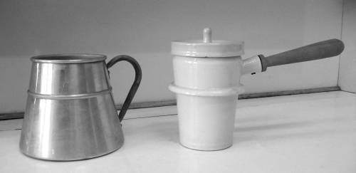 infuzorka